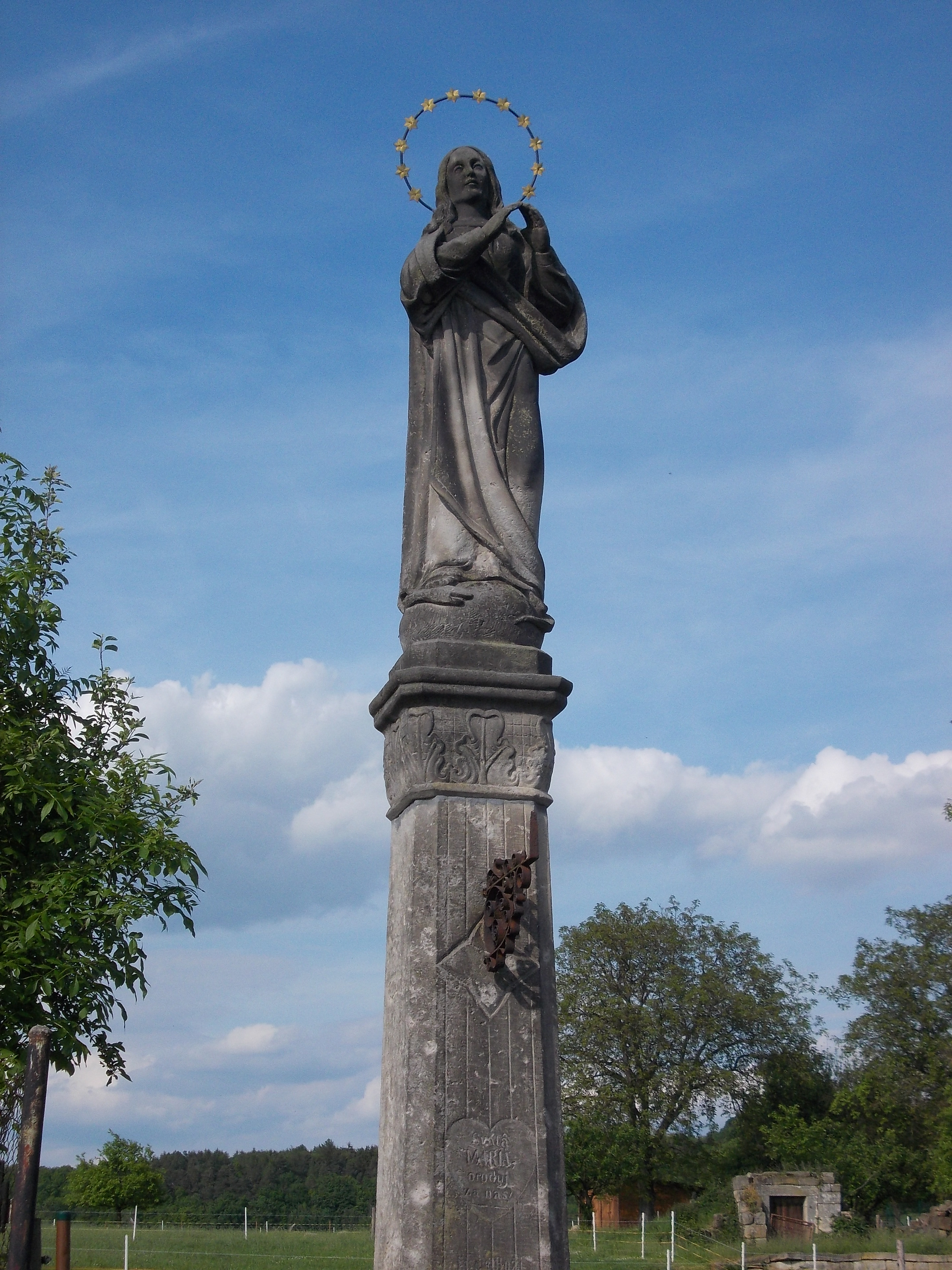 Čálovice - sloup se sochou Panny Marie